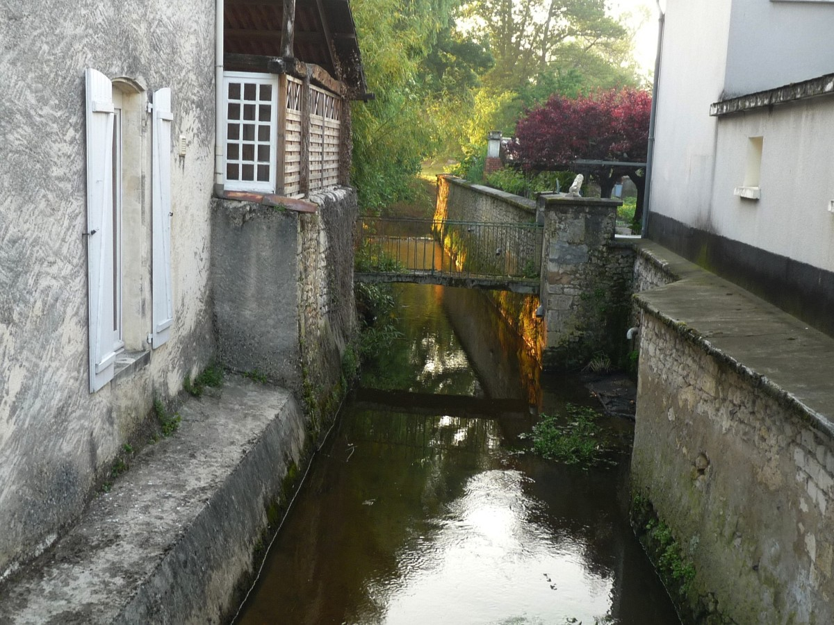 Le Pharaon à Baignes (Charente, France). Pont sur la D.14